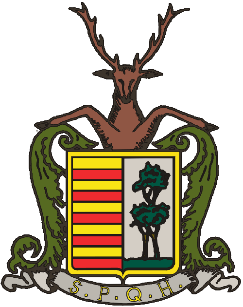 Wapenschild van de stad Hasselt